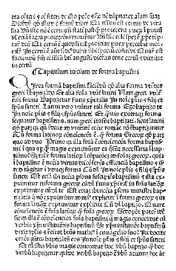 Guido de Monte Rocherii, Manipulus curatorum, Zaragoza, Matthaeus Flander (Mateo Flandro), 15 octubre, 1475. Incunable.